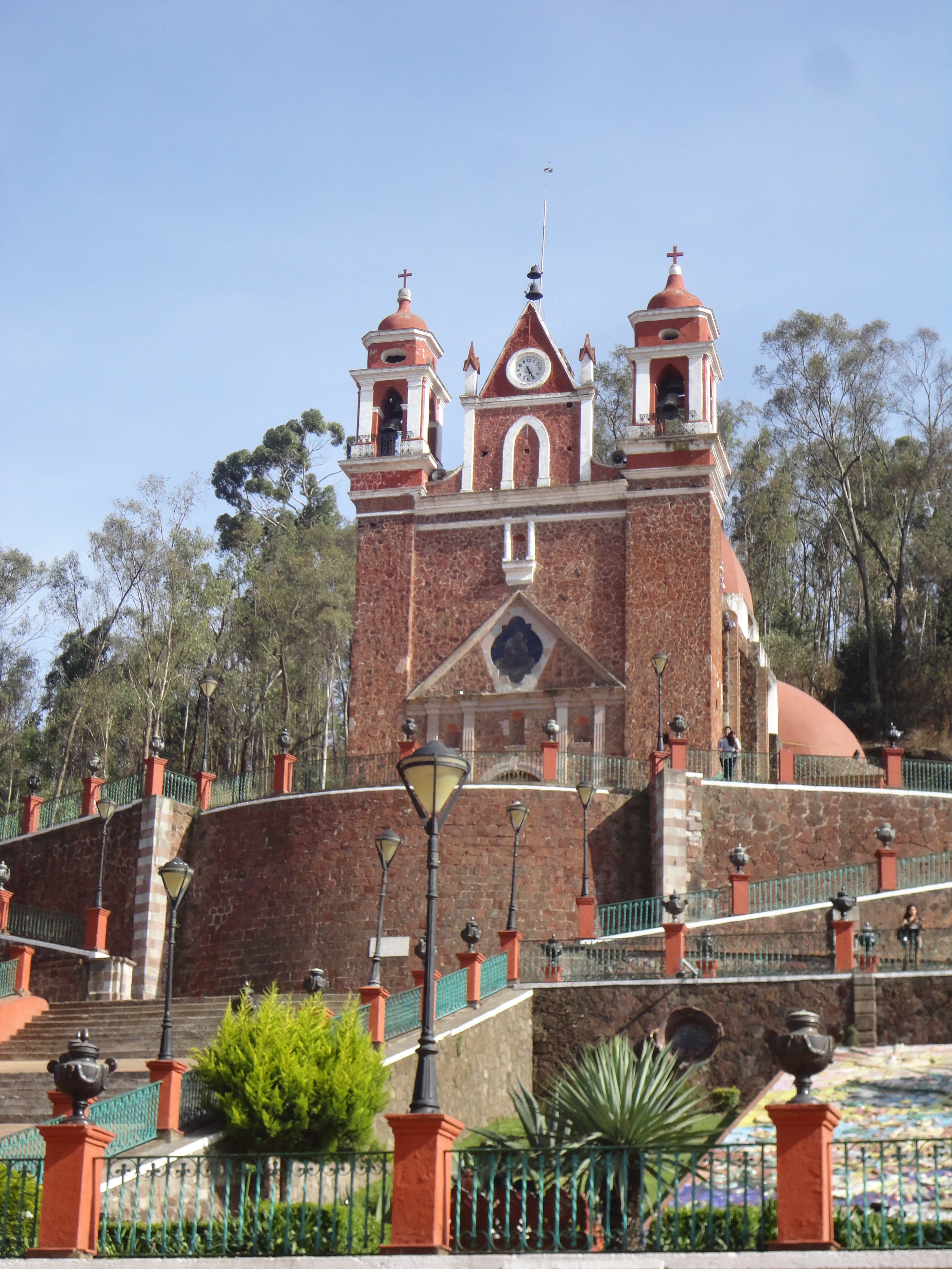 Capilla del Calvario sobre el Cerro de los Magueyes en Metepec, Edomex, México.